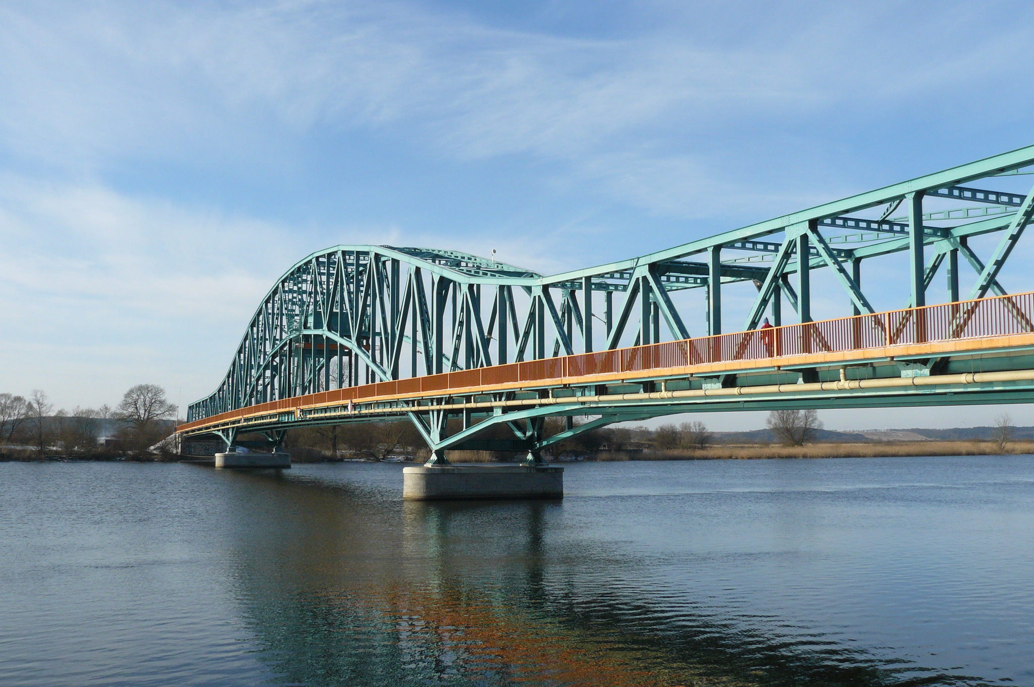 Most na Odrze Wschodniej w Gryfinie.